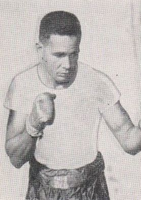 Jackie Graves sur un programme de boxe du 22 novembre 1950.